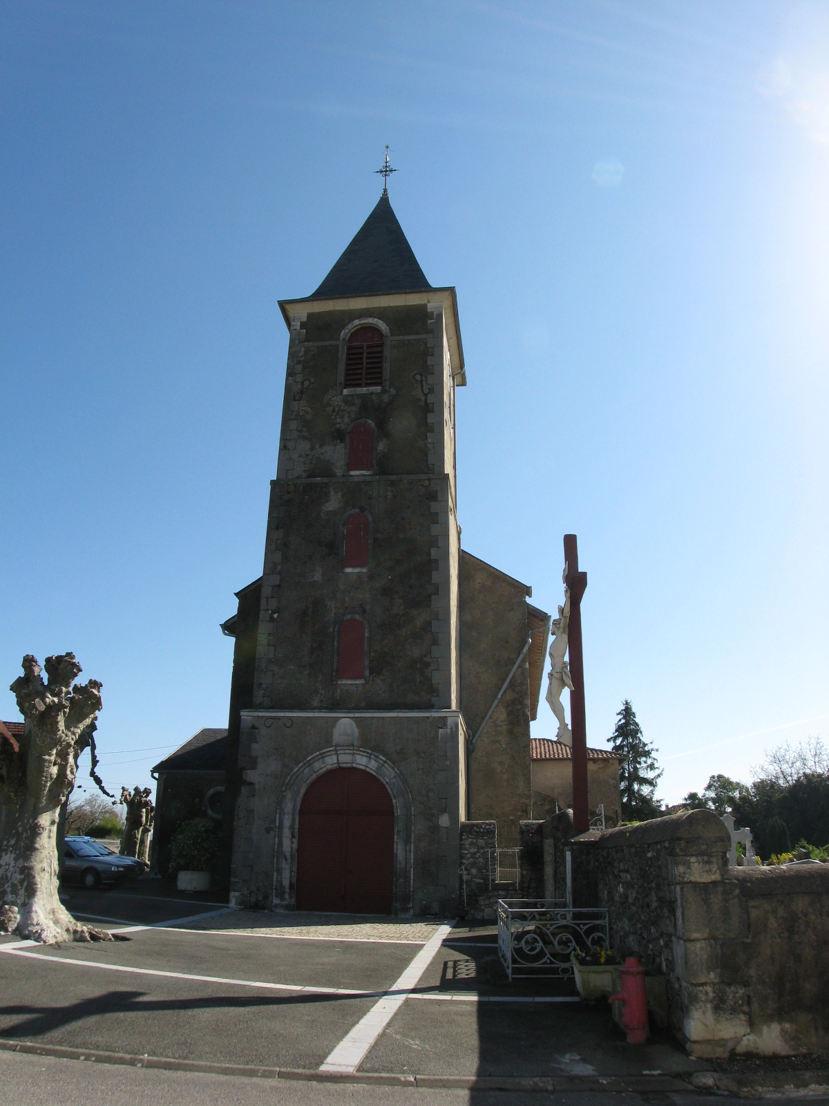 Eglise de Labastide Villefranche (Pyrénées-Atlantiques) (Pyrénées).